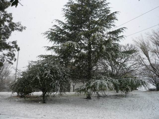 Nieve en el Lago 22/07/09